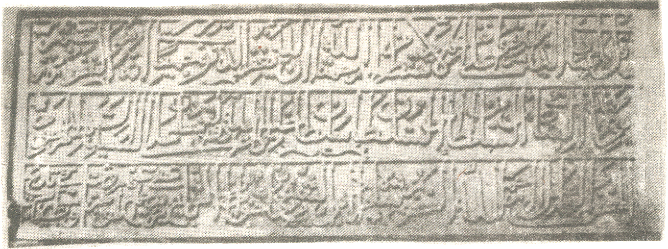 Şah Murad türbəsinin kitabəsi. Quba, Ağbil kəndi